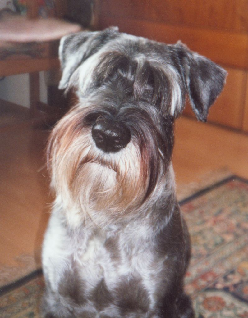 DogSchnauzer